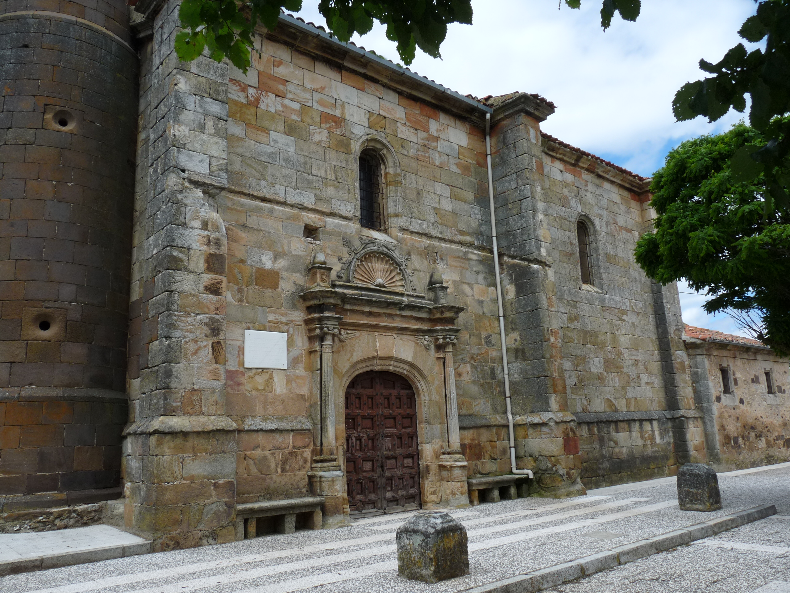 Abejar - Iglesia de San Juan Bautista s. XVI - Lateral